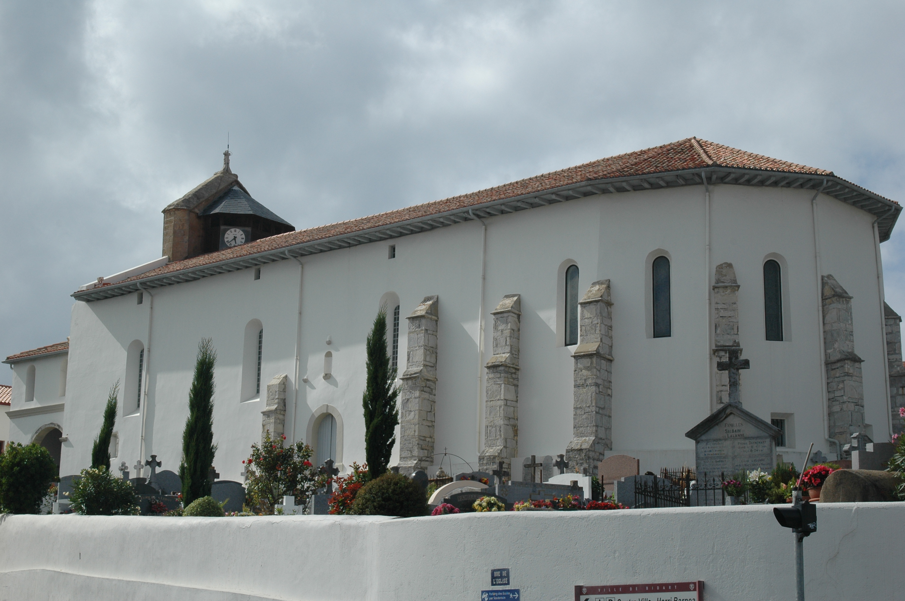 Bidart, l'église. Photo prise le 01/08/06 par Harrieta171